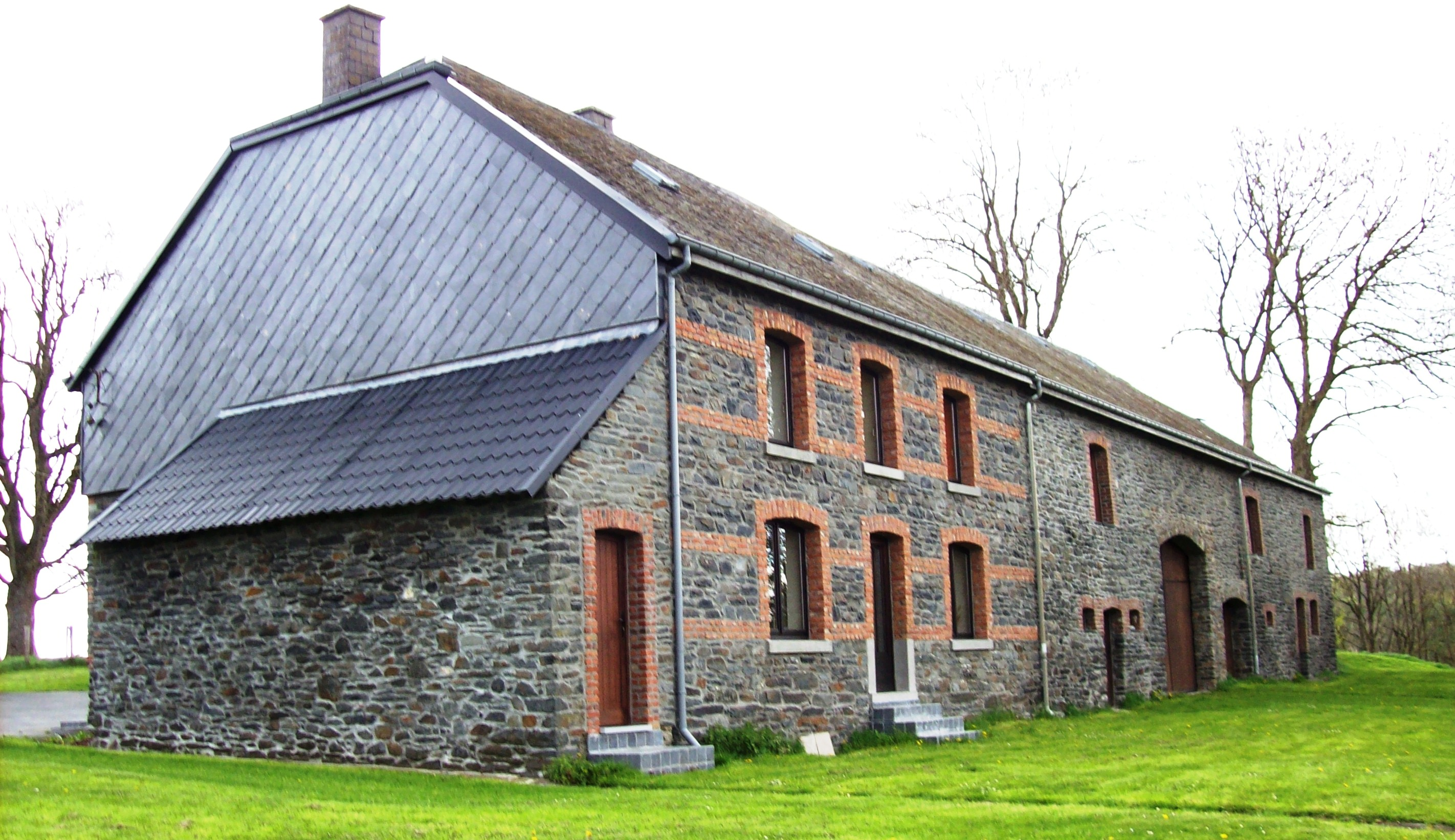 Ortstypisches Anwesen in Flamisoul, auf der anderen Straßenseite gegenüber der Kirche